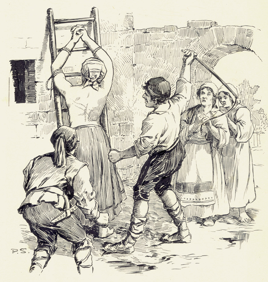 Vorlage zu einer Illustration zu Karl May: In den Schluchten des Balkan, illustrierte Ausgabe 1908, Seite 247 Auspeitschung einer Magd. Federzeichnung No 10 in schwarzer Tusche, auf Karton. Monogrammiert: "P.S.". Bildgröße: 15,5 x 15 cm. Kartongröße: 29 x 20,4 cm.